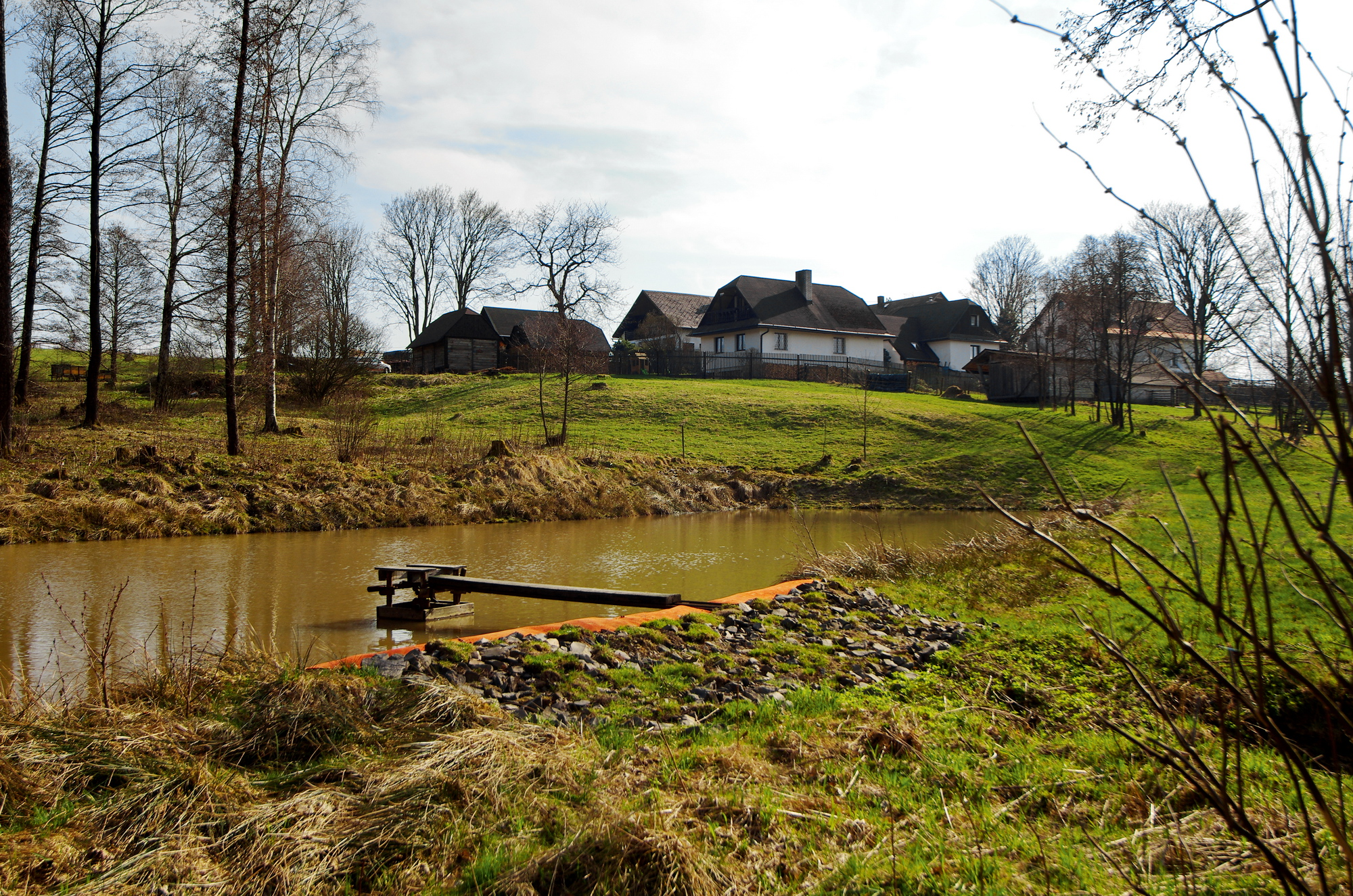 Heřmanov, osada obce Jindřichovice, Krušné hory, okres Sokolov